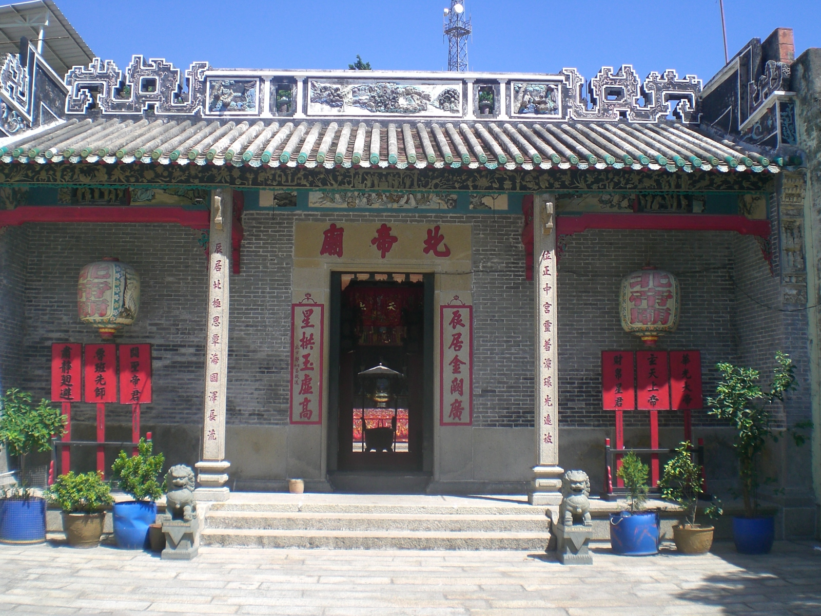 澳門北帝廟, Macau Pak Tei Temple位於氹仔島.